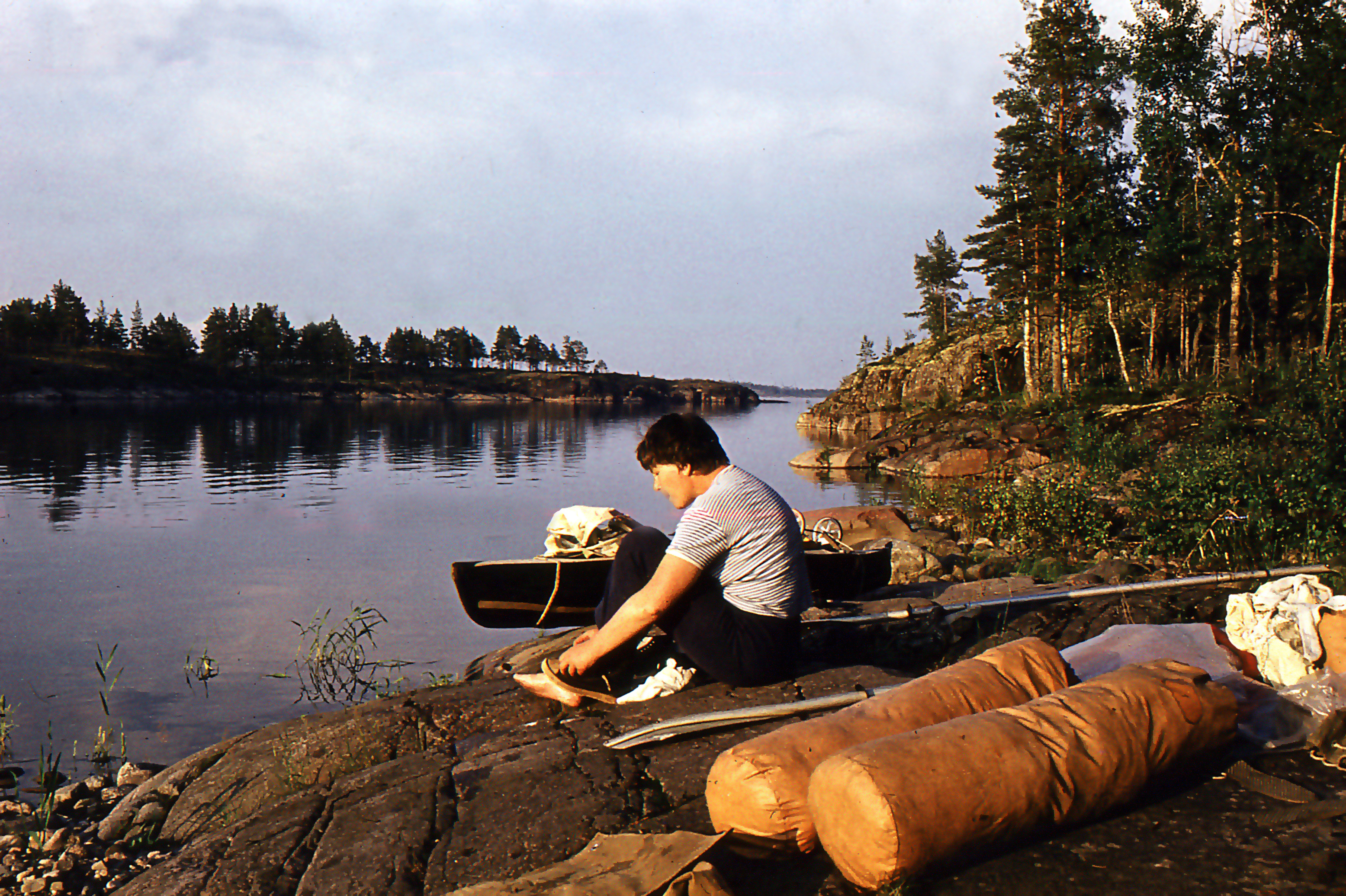 Ladoga Lake evening.